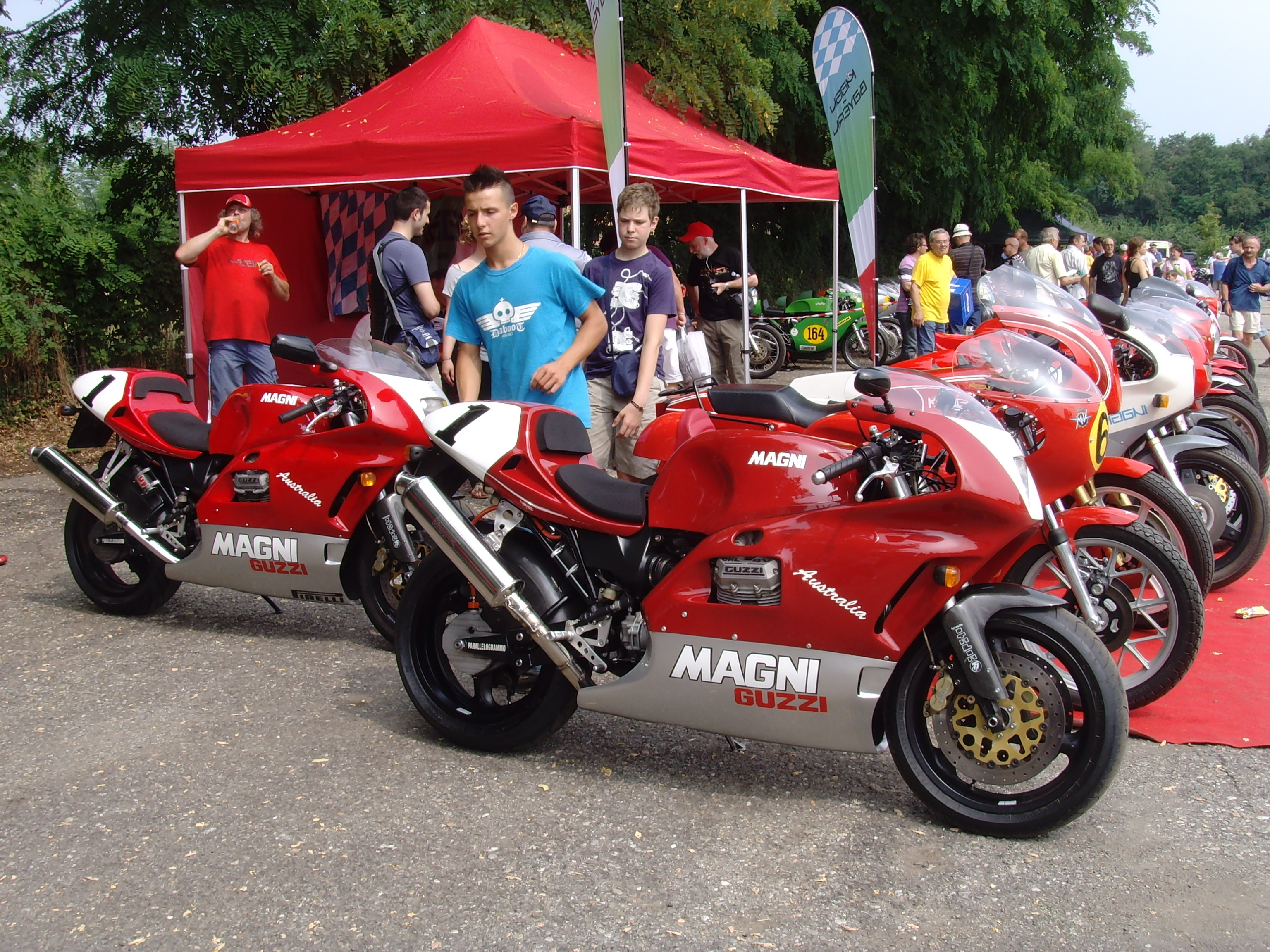 Magni Australia '98 1000 con propulsore Moto Guzzi